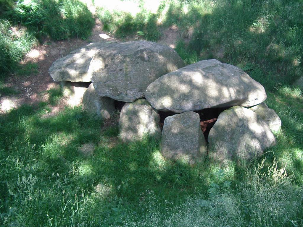 Wanna, Land Hadeln (Sietland), Megalithgrab am Postweg